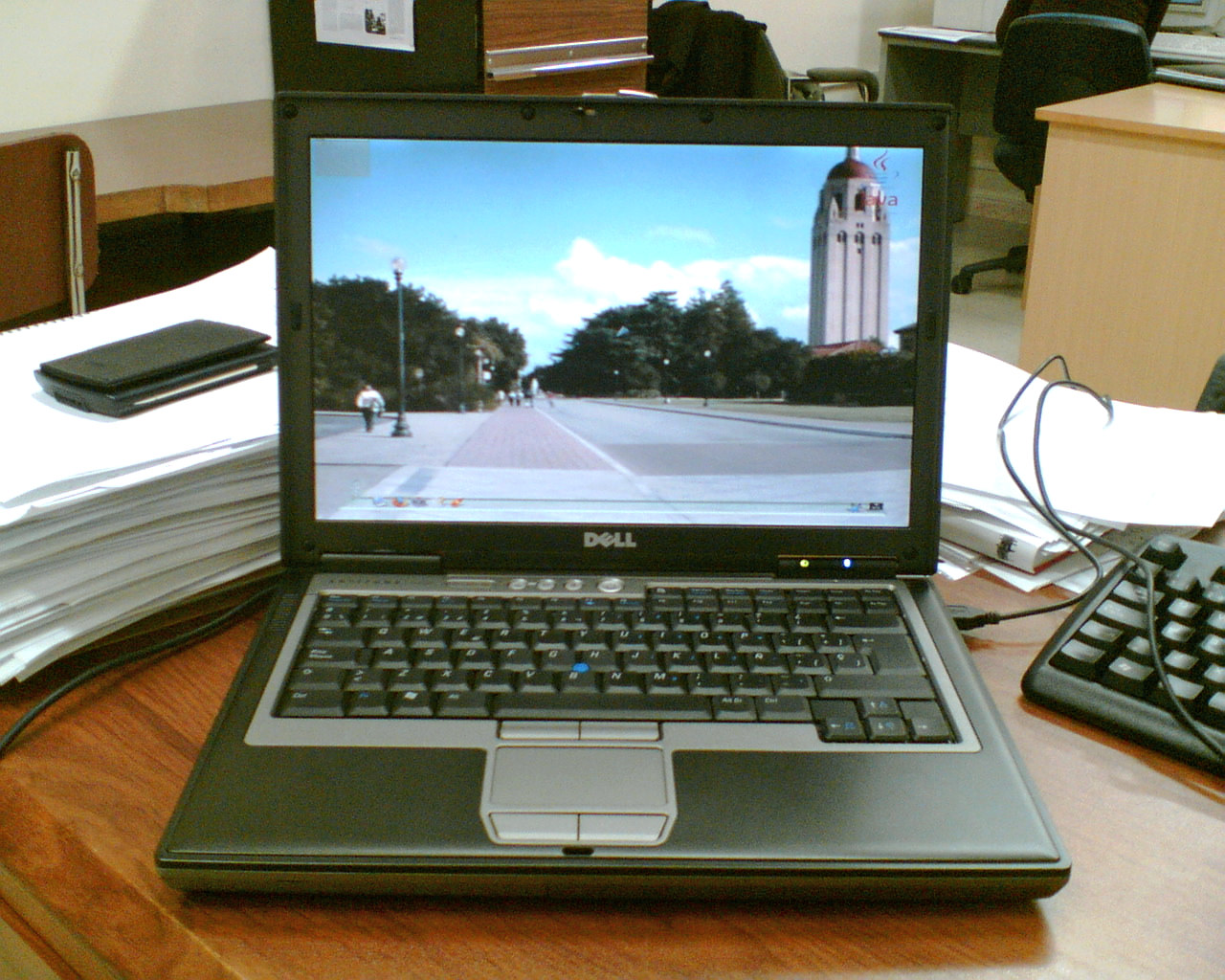 Hace unos días estuve probando Looking Glass en el portátil.